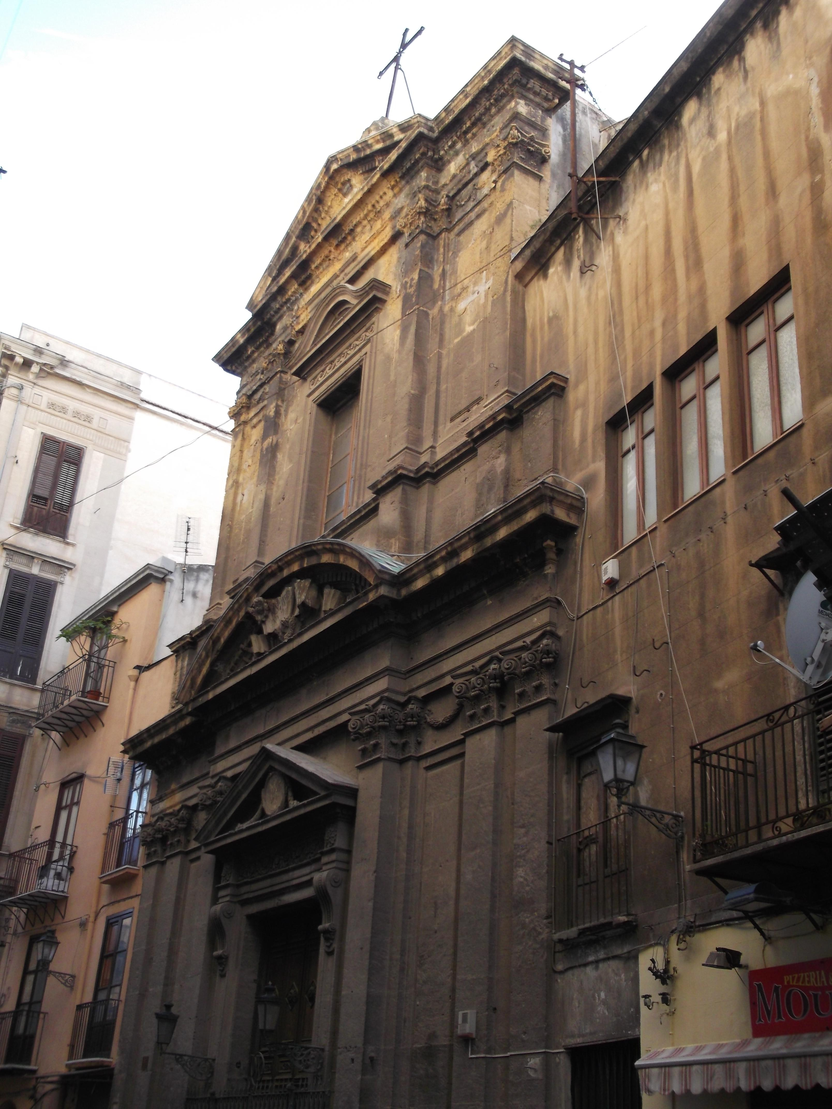 facciata